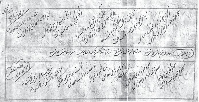 تصویری از نسخه خطی اشعار گیلکی خان احمد دوم کیاییمازِرونی: خان احمد خانِ گلکی شعرون ِخطی نوسخه